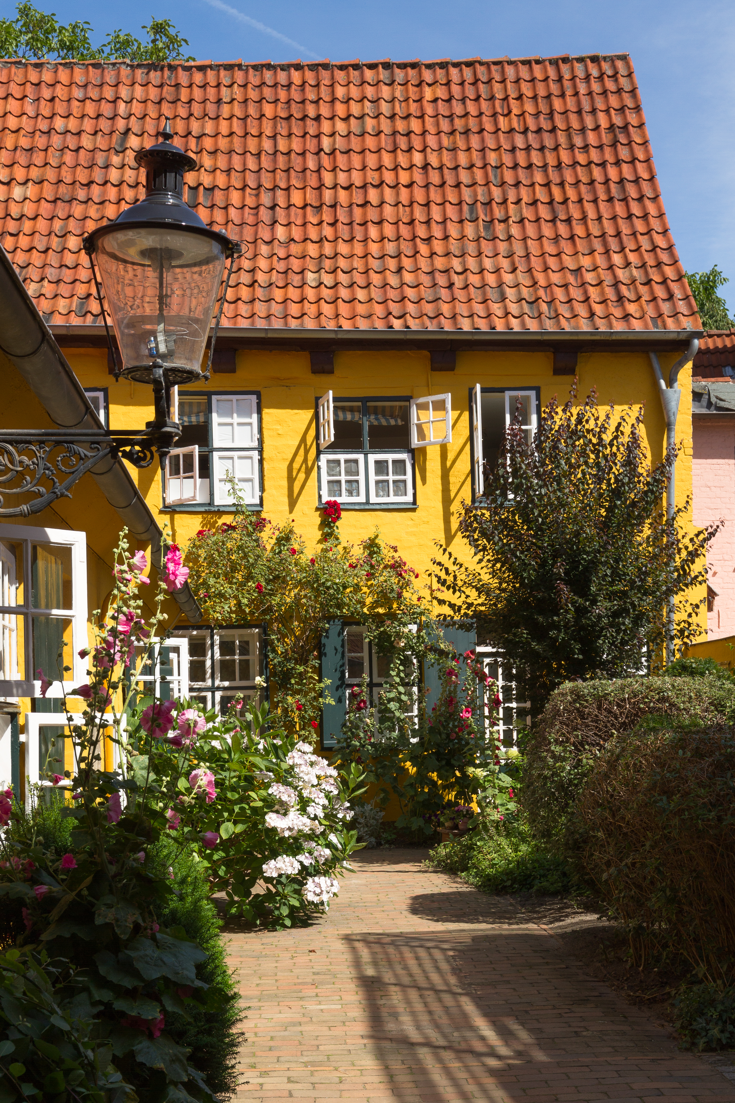 Schmaler, ursprünglich für ältere und arme Menschen bestimmter Wohngang in der Lübecker Wahmstraße 73–77. Der Gang ist nach dem Lübecker Bürgermeister Gotthard von Höveln (1603–1671) benannt.